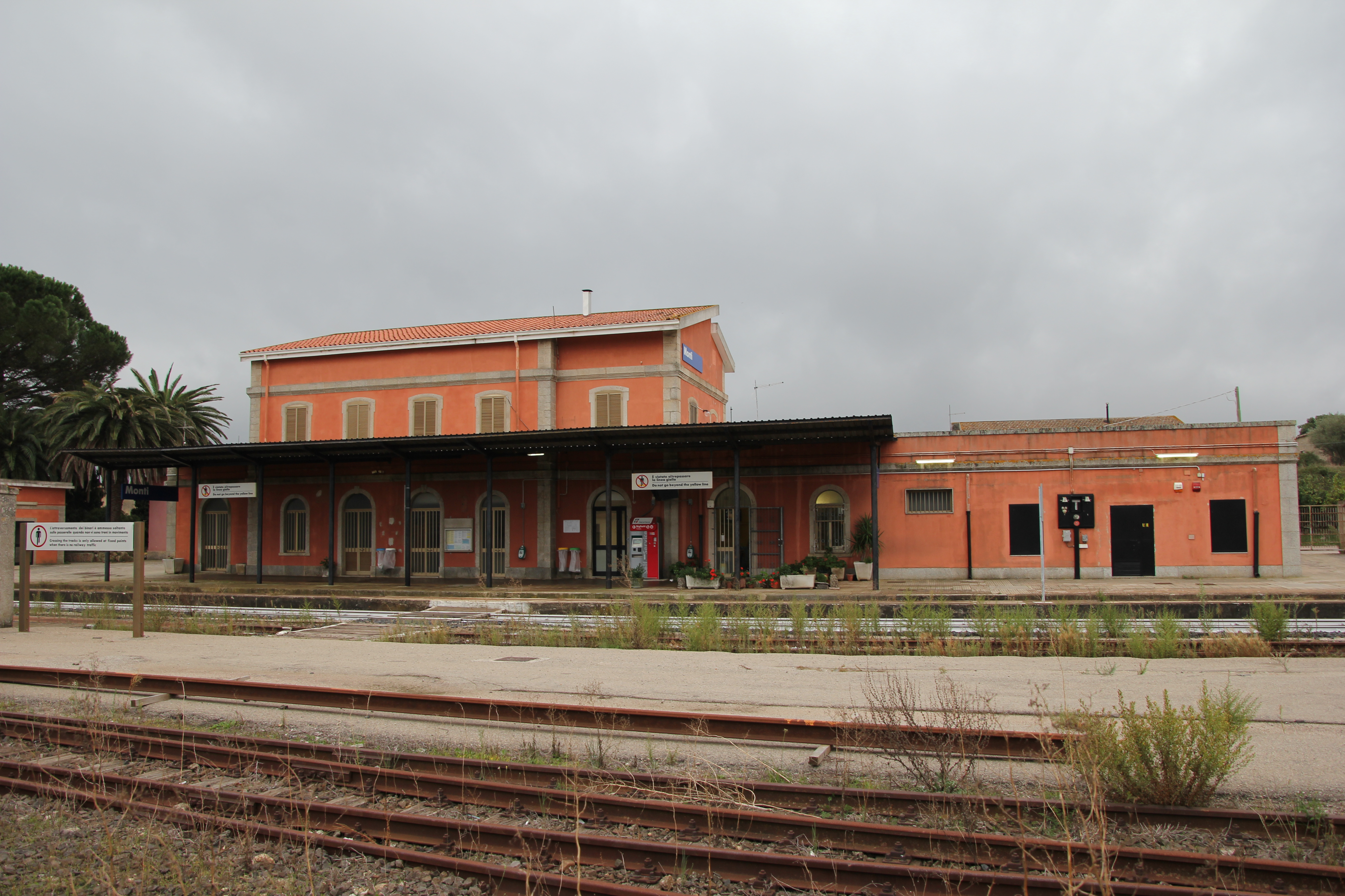 Monti, stazione ferroviaria